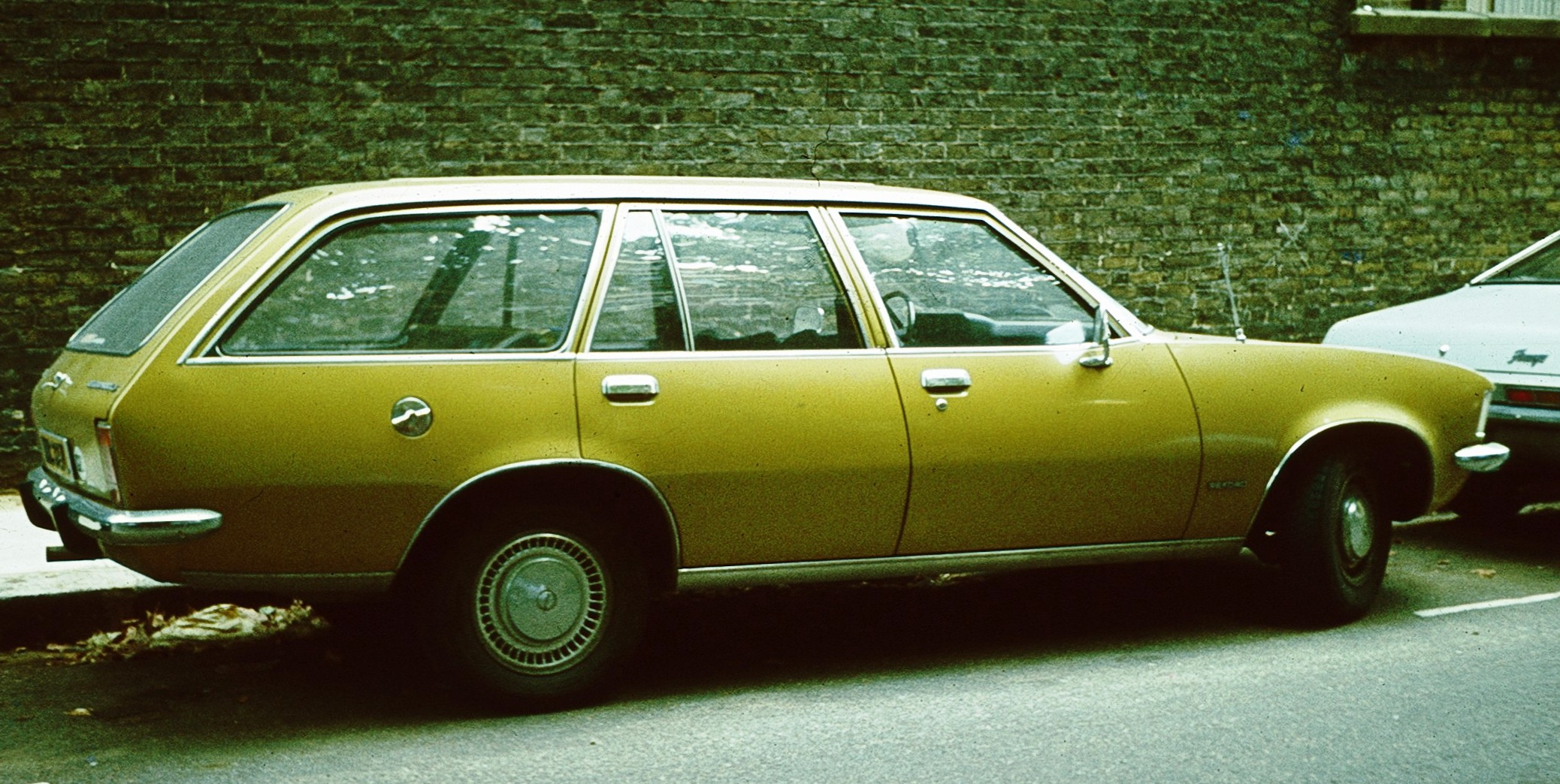 Opel Rekord D Caravan in England